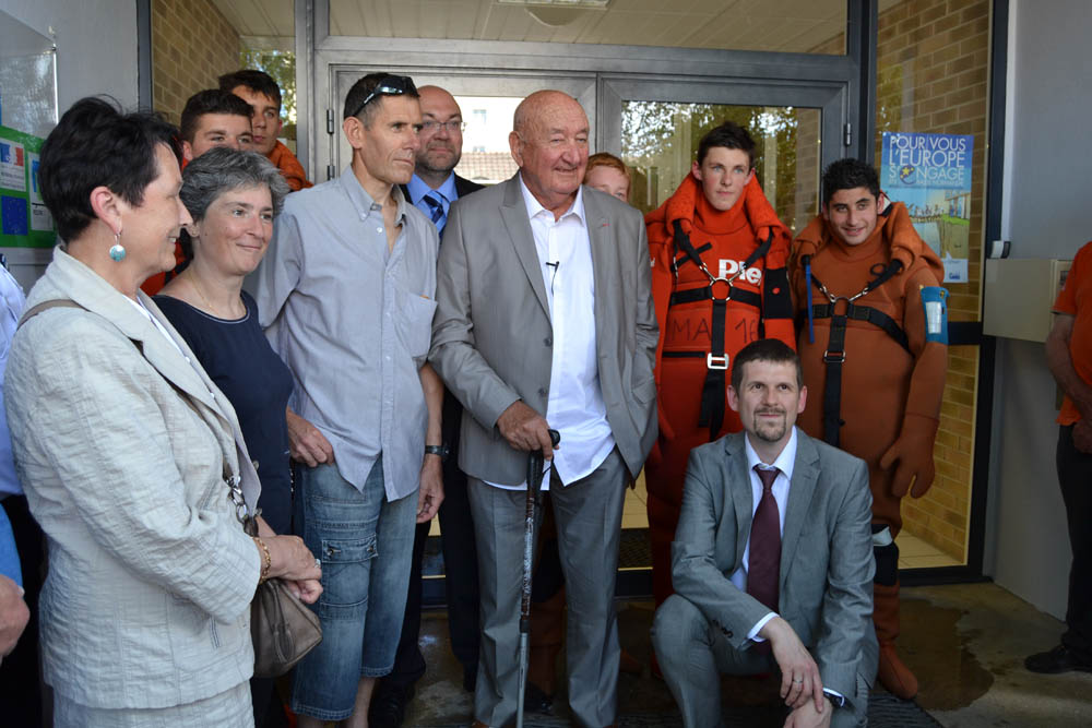 Sur le parvis du LPMA rue Matignon à Cherbourg le jour de l'inauguration du nom du lycée. Au fond (plus ou moins masqués): les 5 lycéens ayant volontairement revêtu la combinaison Piel (2 modèles) après une démonstration dans le bassin du commerce. De droite à gauche : accroupi, Vincent Lequenne directeur de l'établissement , Daniel Rigolet, Stéphane Travert député de la Manche et conseiller régional, Didier Plouhinec enseignant d'EPS qui a proposé le nom finalement retenu par consultation démocratique interne au lycée, Muriel Jozeau-Marigné conseillère régionale et conseillère municipale 9ème adjointe au maire, Marie-Françoise Lebonnois conseillère municipale déléguée.